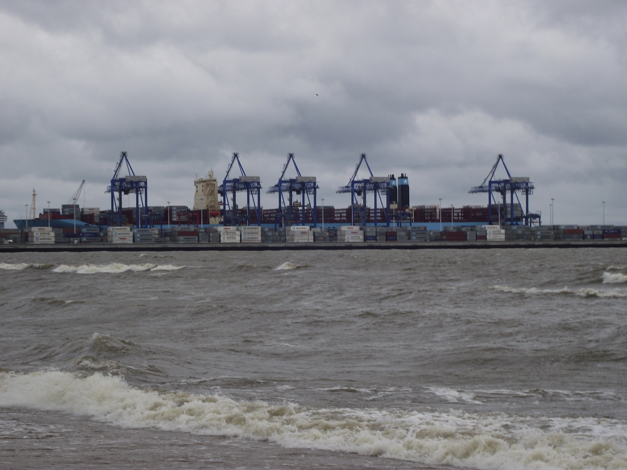 Gdańsk - Stogi (przeładunek kontenerowy)